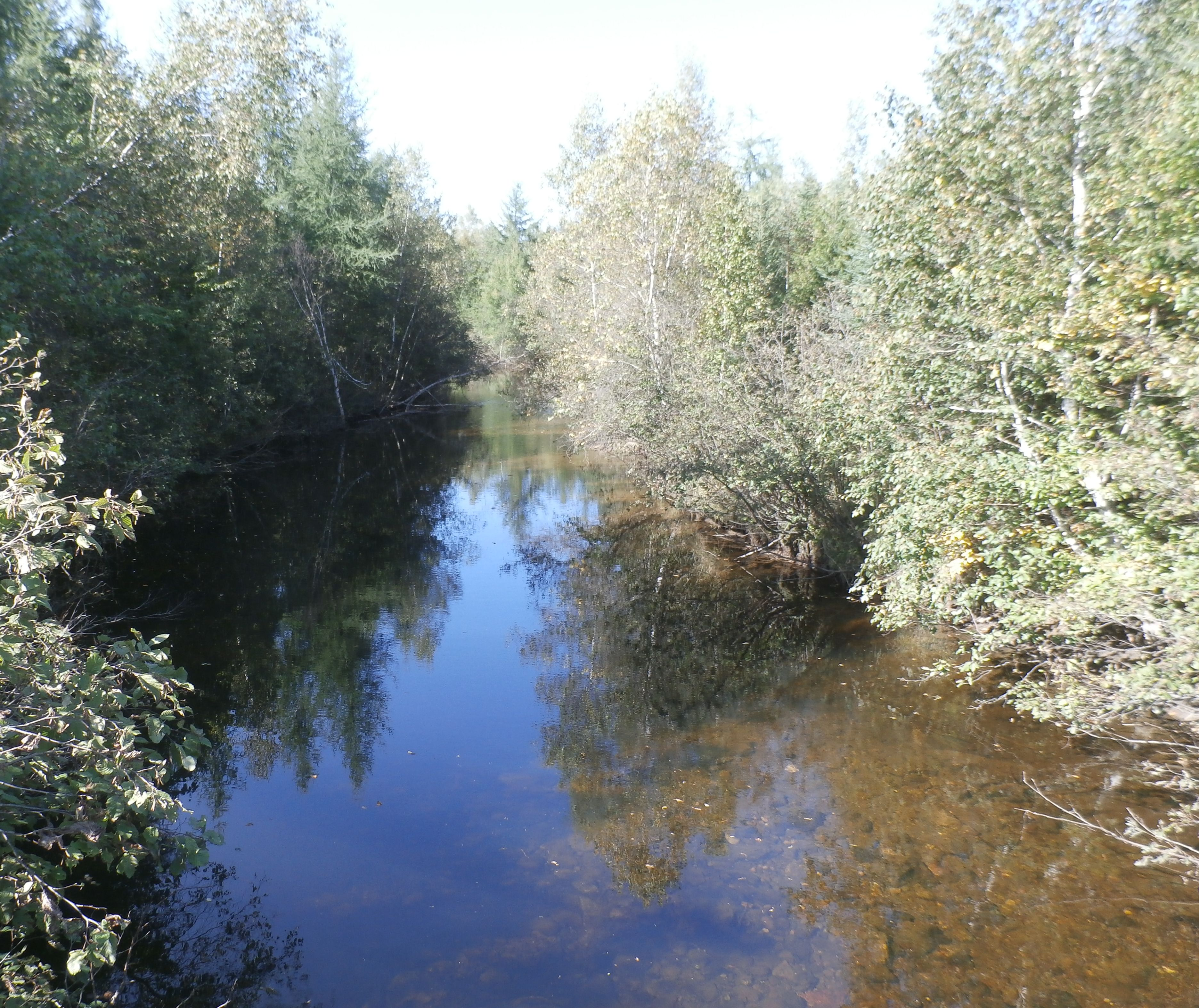 Rivière Maskinongé en aval du pont de la route 161 près de Stratford.